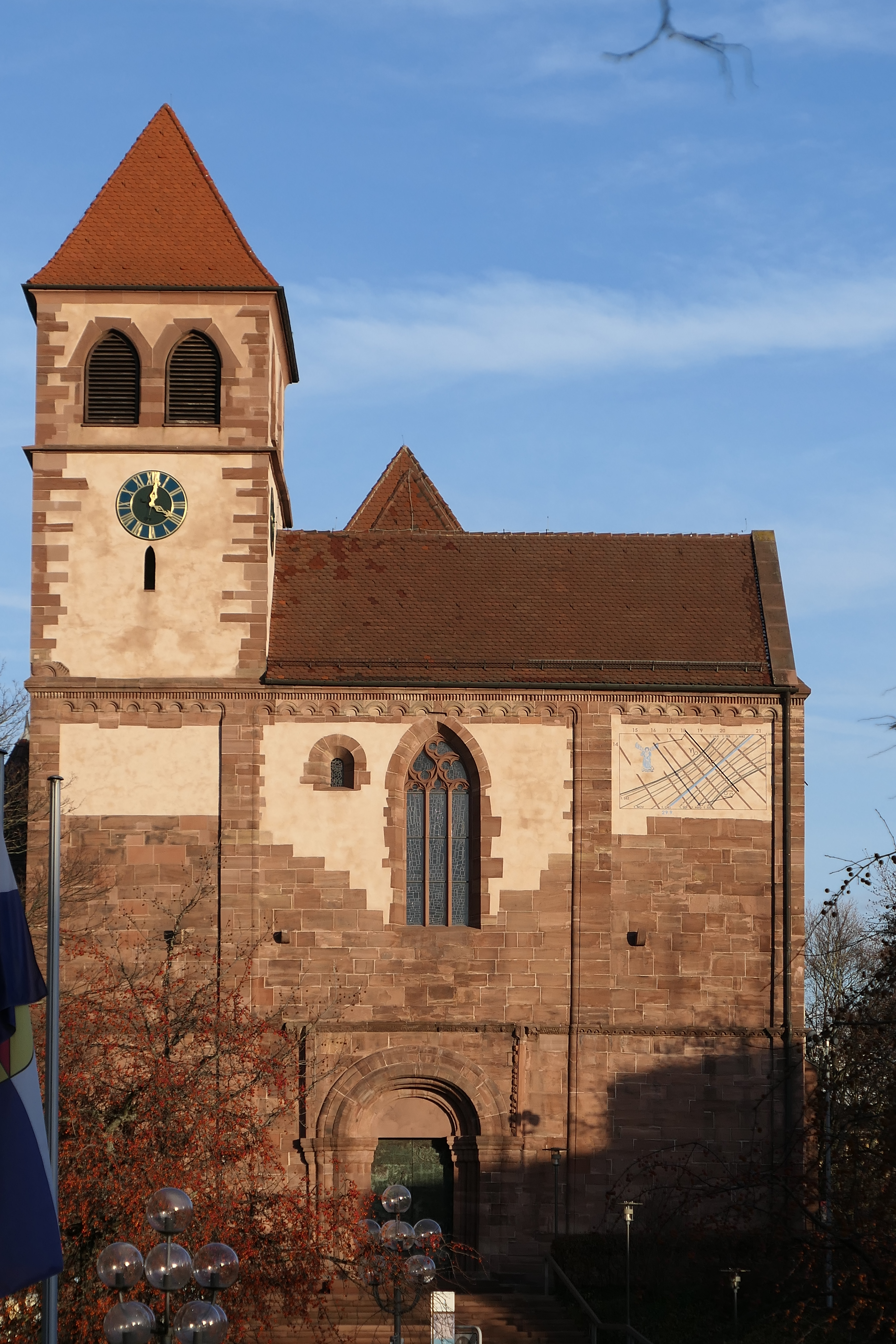 Westfassade